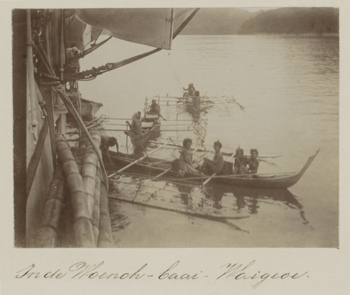 Academische Collecties: 1899-1900, Siboga-expeditie naar Nederlands Oost-Indië, onder leiding van Max Wilhelm Carl Weber Drie trimarans met Papoea's langszij de Siboga.